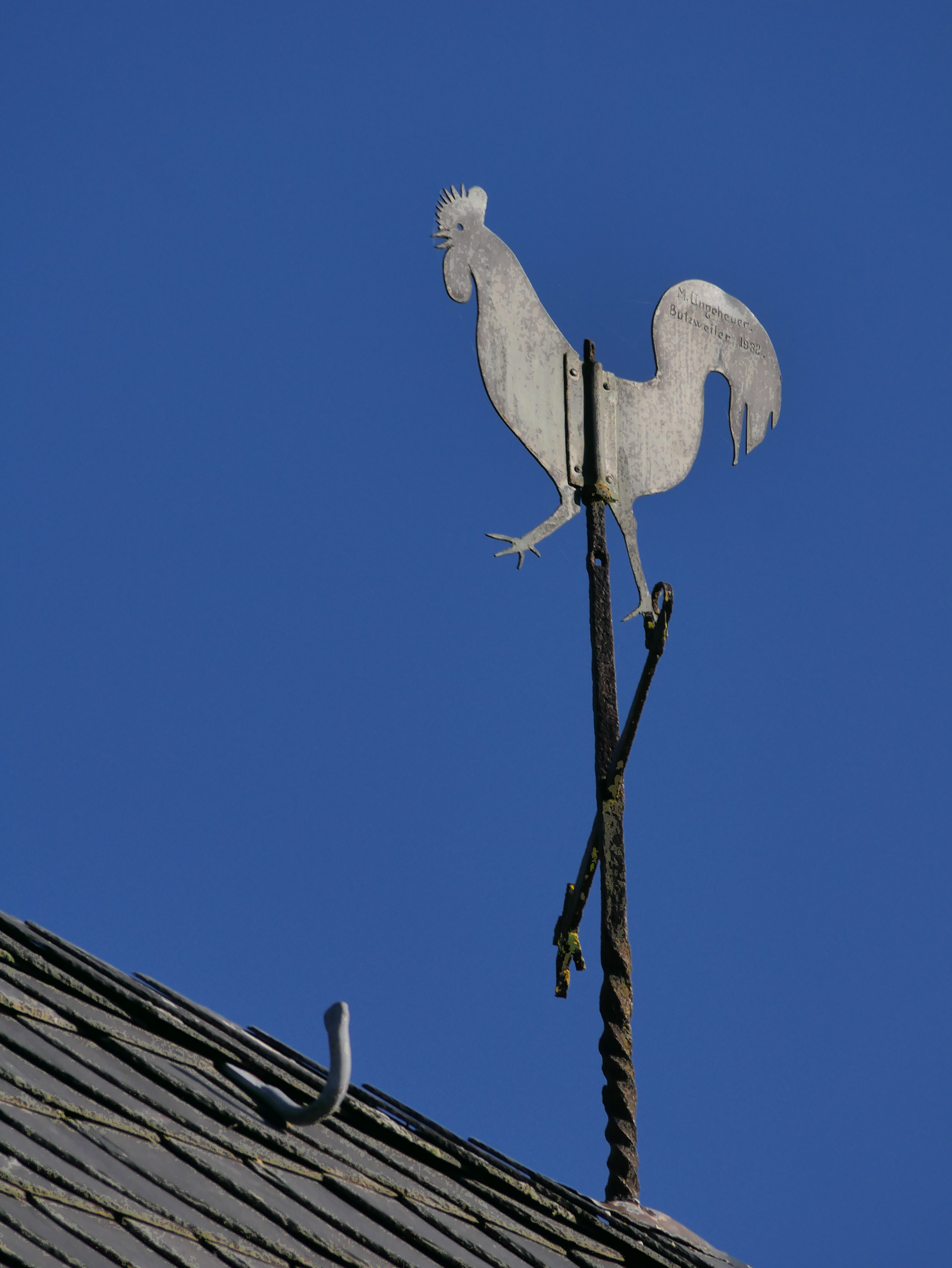 Kirchturmhahn; Kirche St. Abriuculus in Besslich (Rheinland-Pfalz, Kreis Trier-Saarburg)